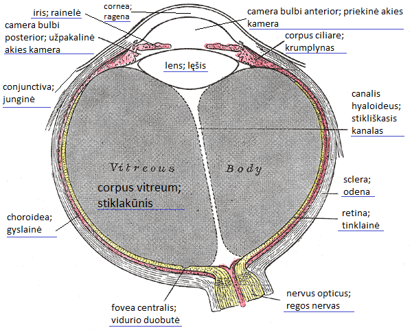 Akies sandara